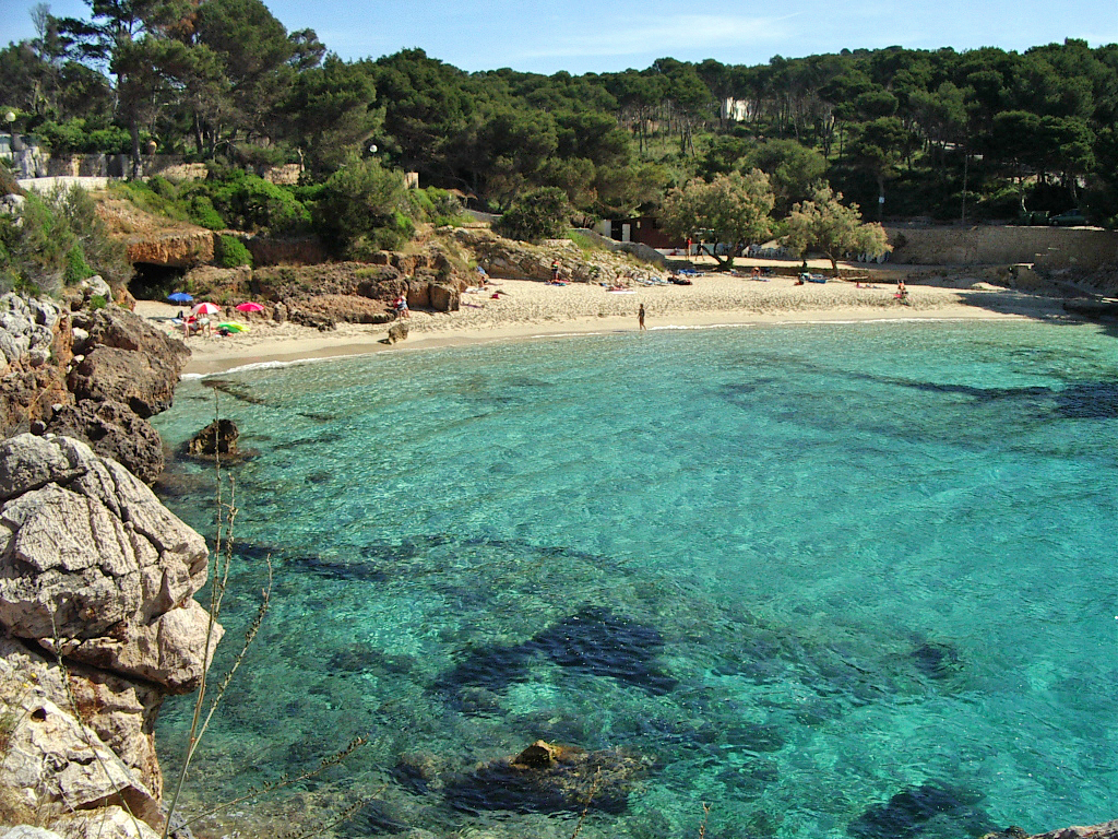 Cala Gat beach, Cala Rajada, Mallorca